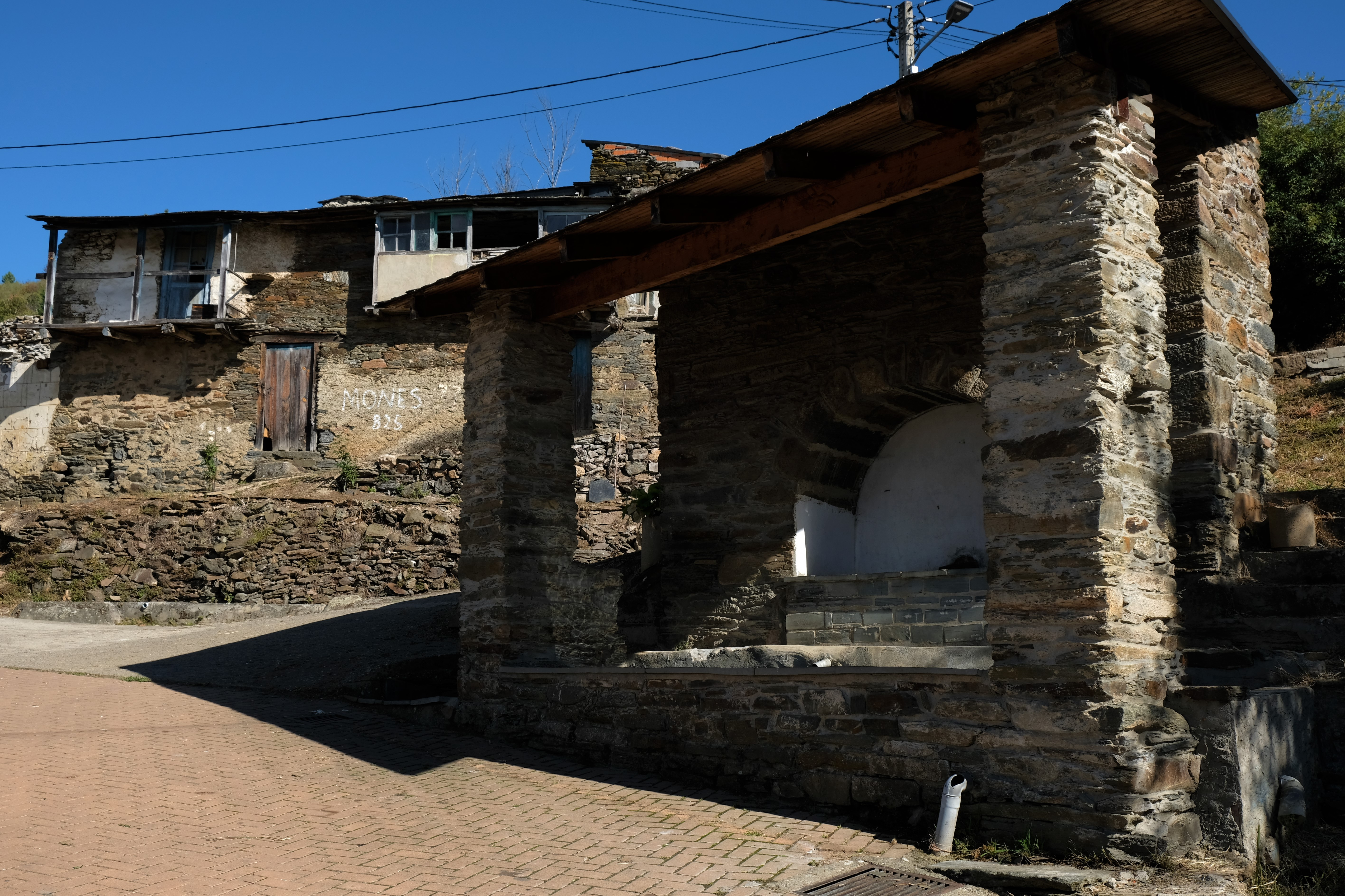 Lavadero de Mones